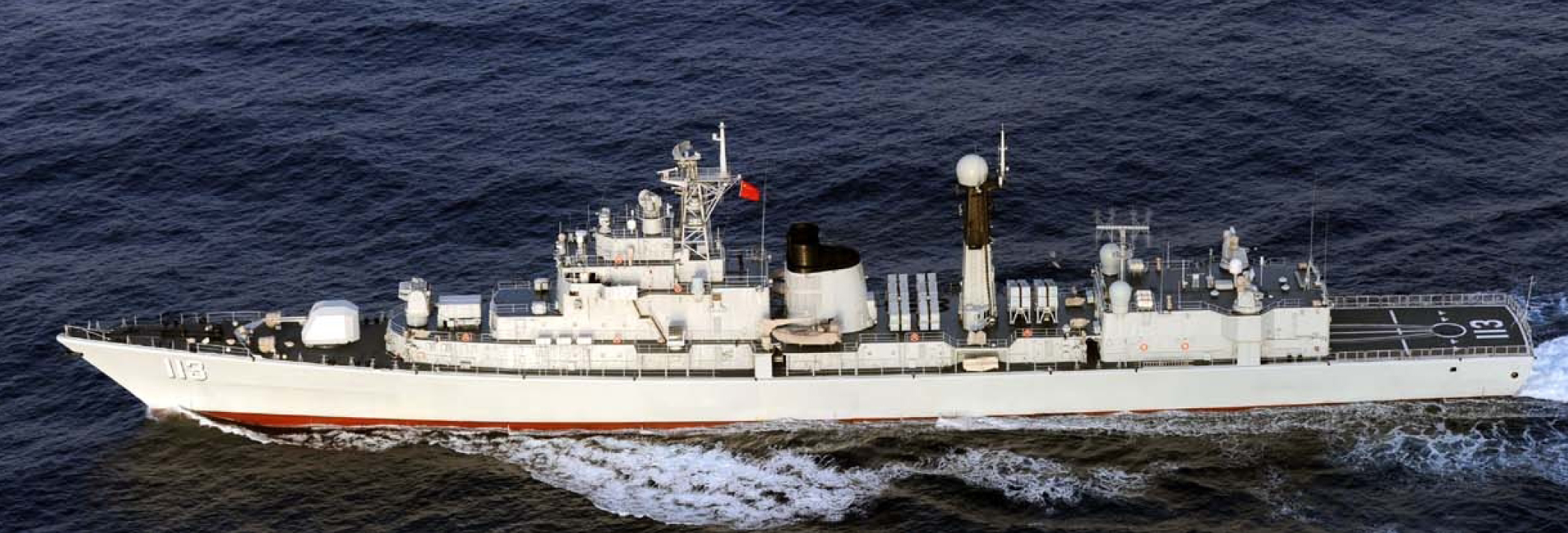 ５月２７日（月）午後１時頃、海上自衛隊第１２護衛隊「せんだい」（呉）及び第５航空群所属「Ｐ－３Ｃ」（那覇）が、宮古島の北東約１１０ｋｍの海域を東シナ海から太平洋に向けて南東進する中国海軍ルフ級駆逐艦１隻、ジャンカイⅡ級フリゲート１隻及びフーチン級補給艦１隻の合計３隻を確認しました。